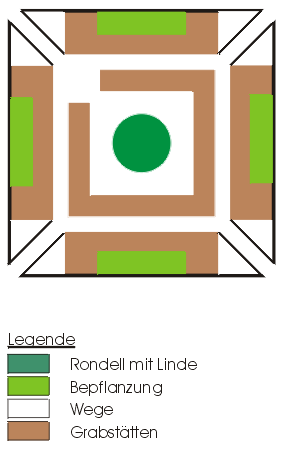 Friedhof der maerzgefallenen 1848